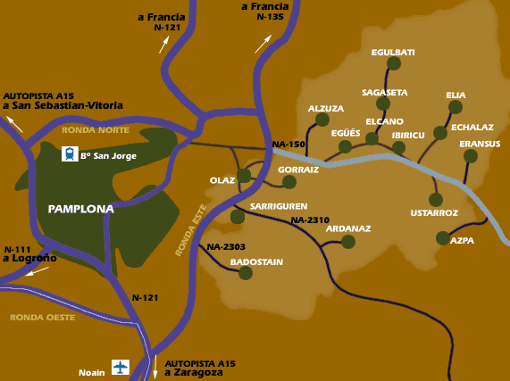 mapa de situacion de gorraiz